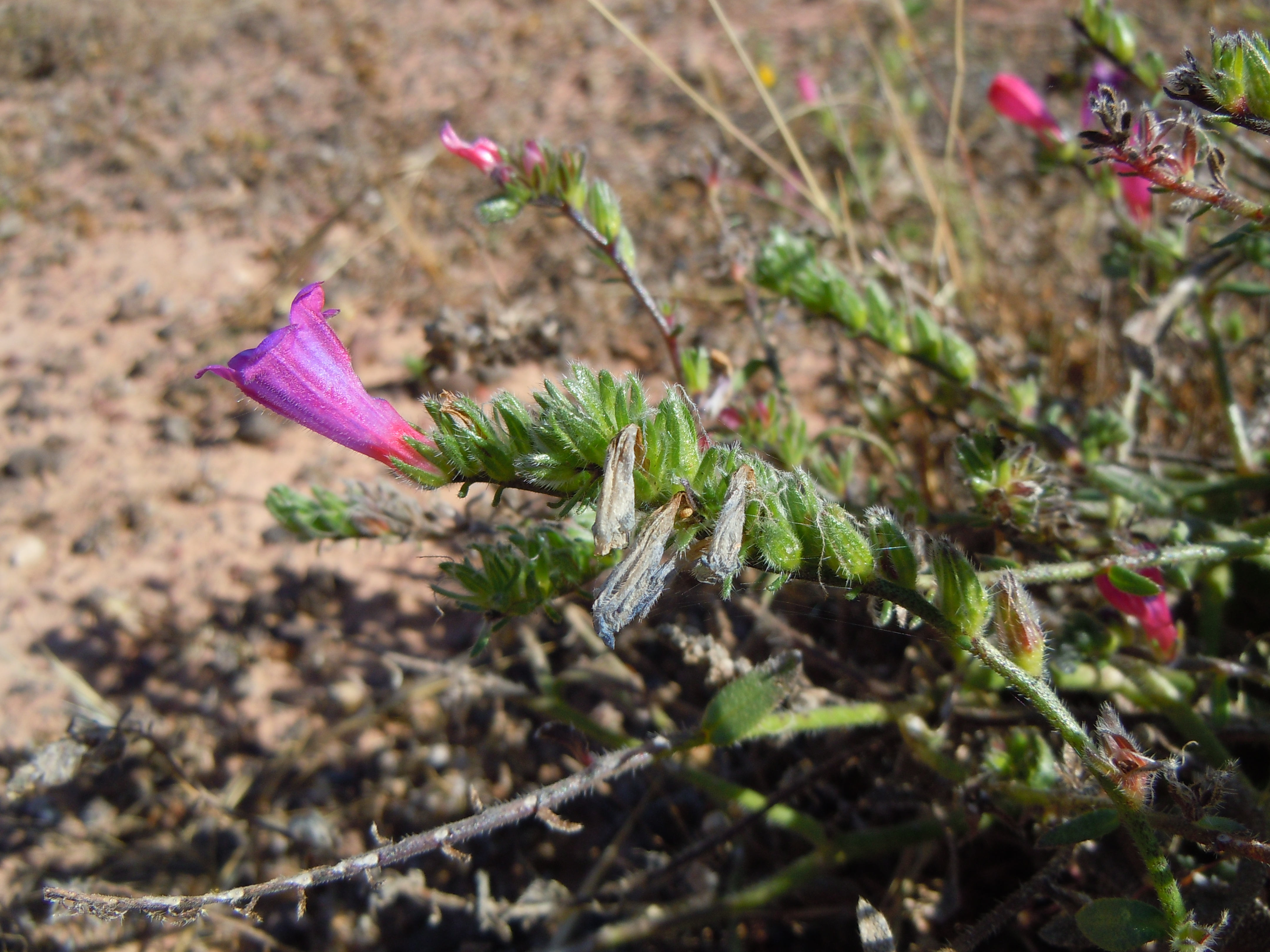 Echium lancerottense, Montaña Roja, Lanzarote.